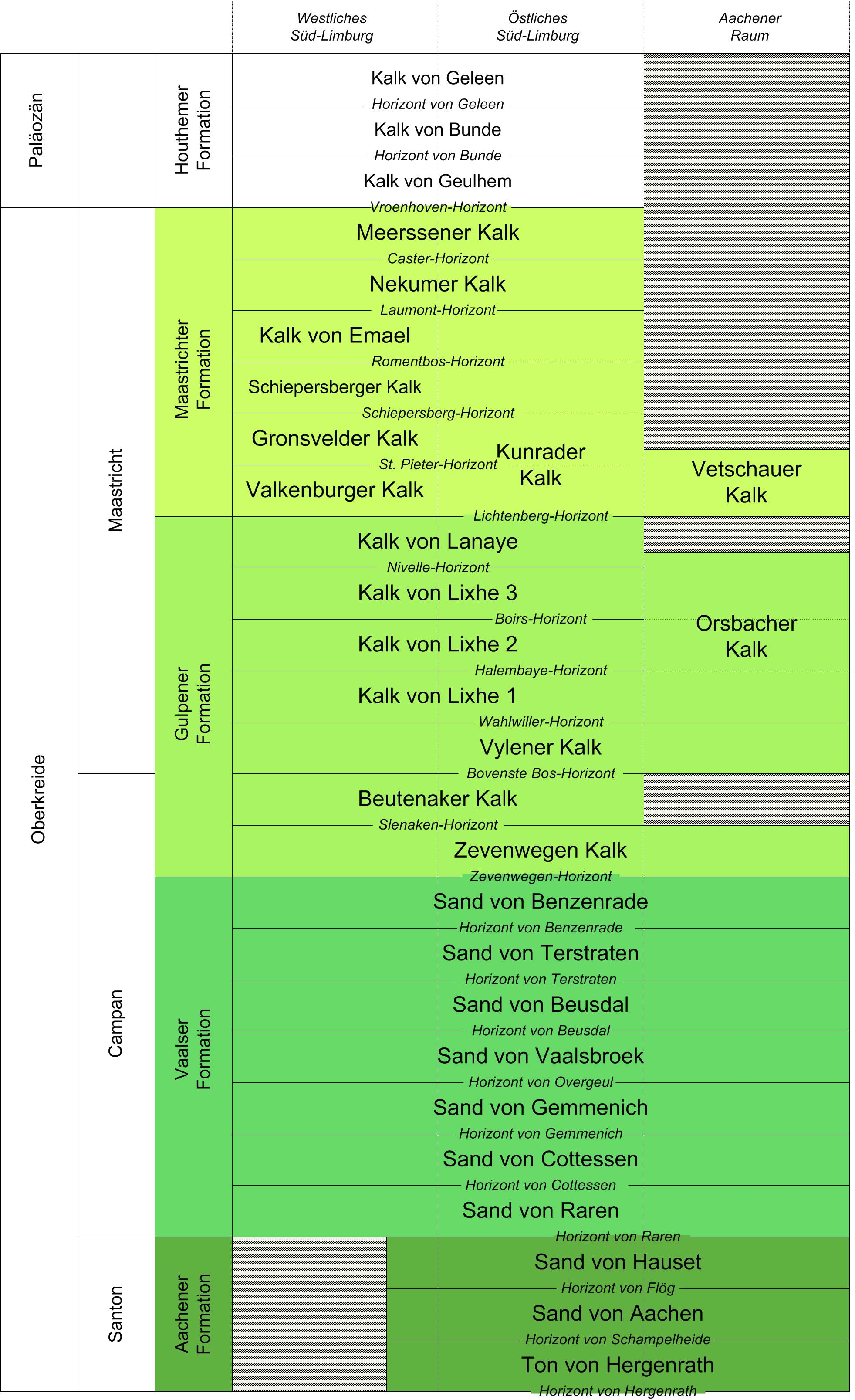 Die Kreideschichten im Südlimburger und Aachener Raum nach Grafiken von Felder/Bosch und Richter